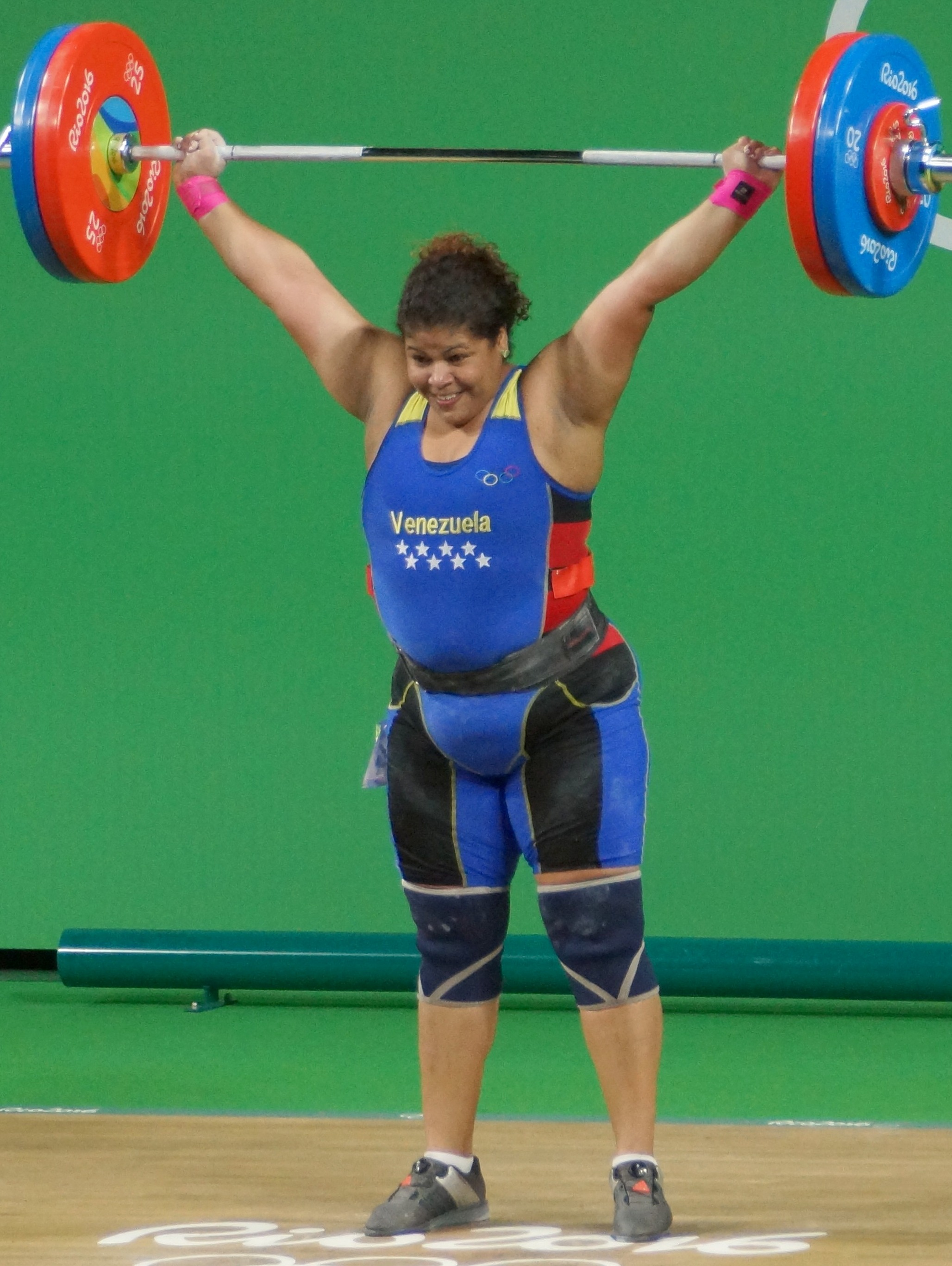 Yaniuska Espinosa, Rio Olympics